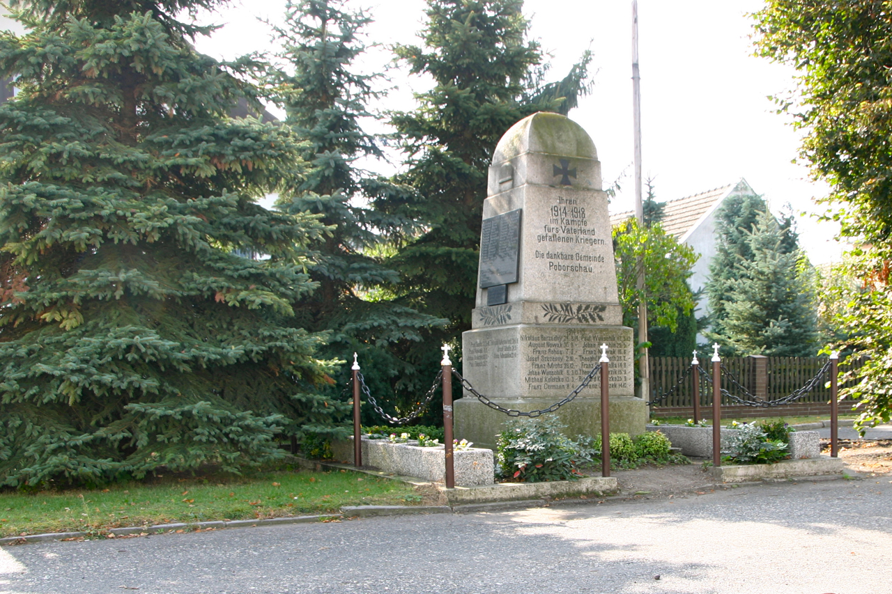 Poborszów (dodatkowa nazwa w j. niem. Poborschau) – wieś w Polsce położona w województwie opolskim, w powiecie kędzierzyńsko-kozielskim, w gminie Reńska Wieś.